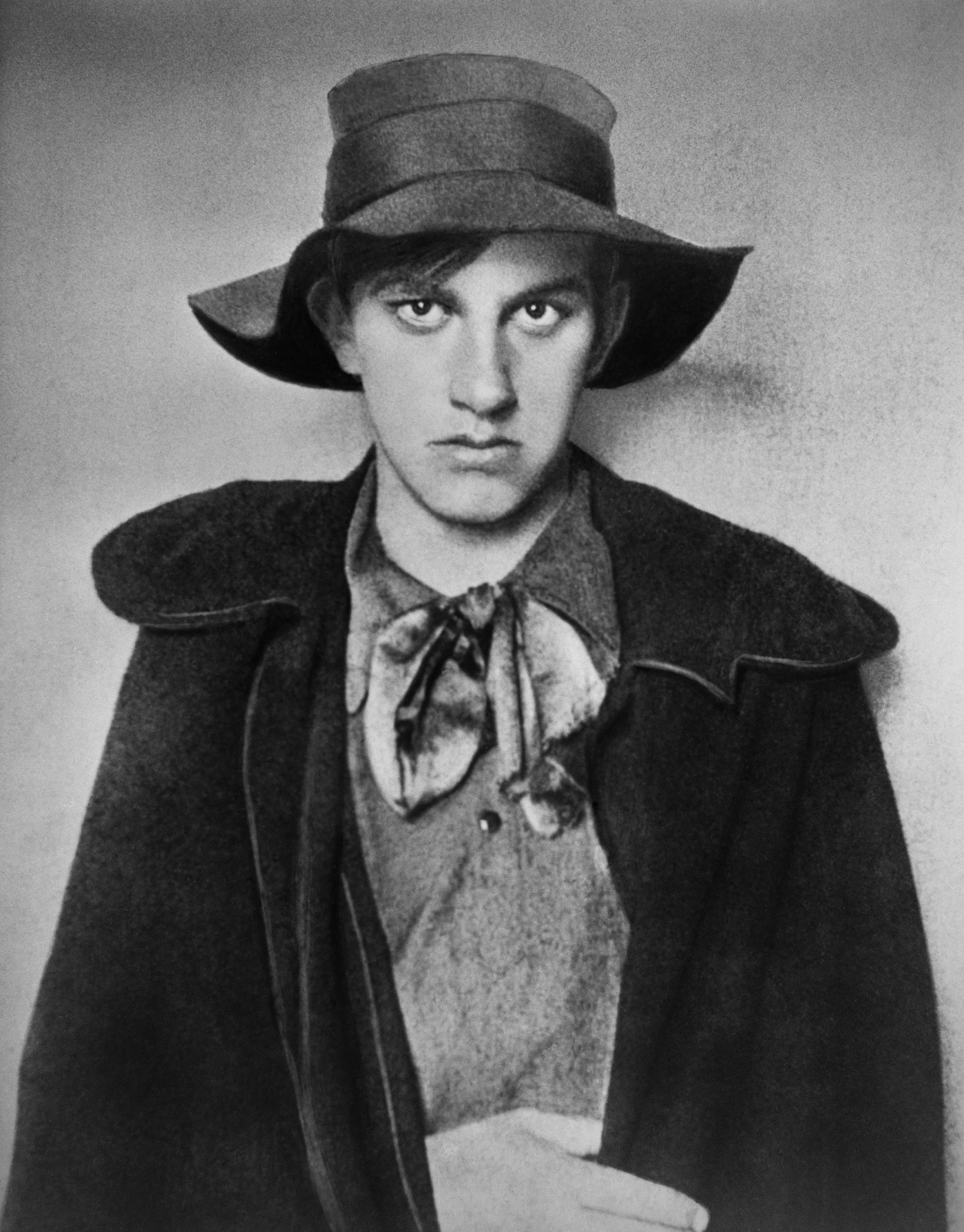 Маяковский, Владимир Владимирович